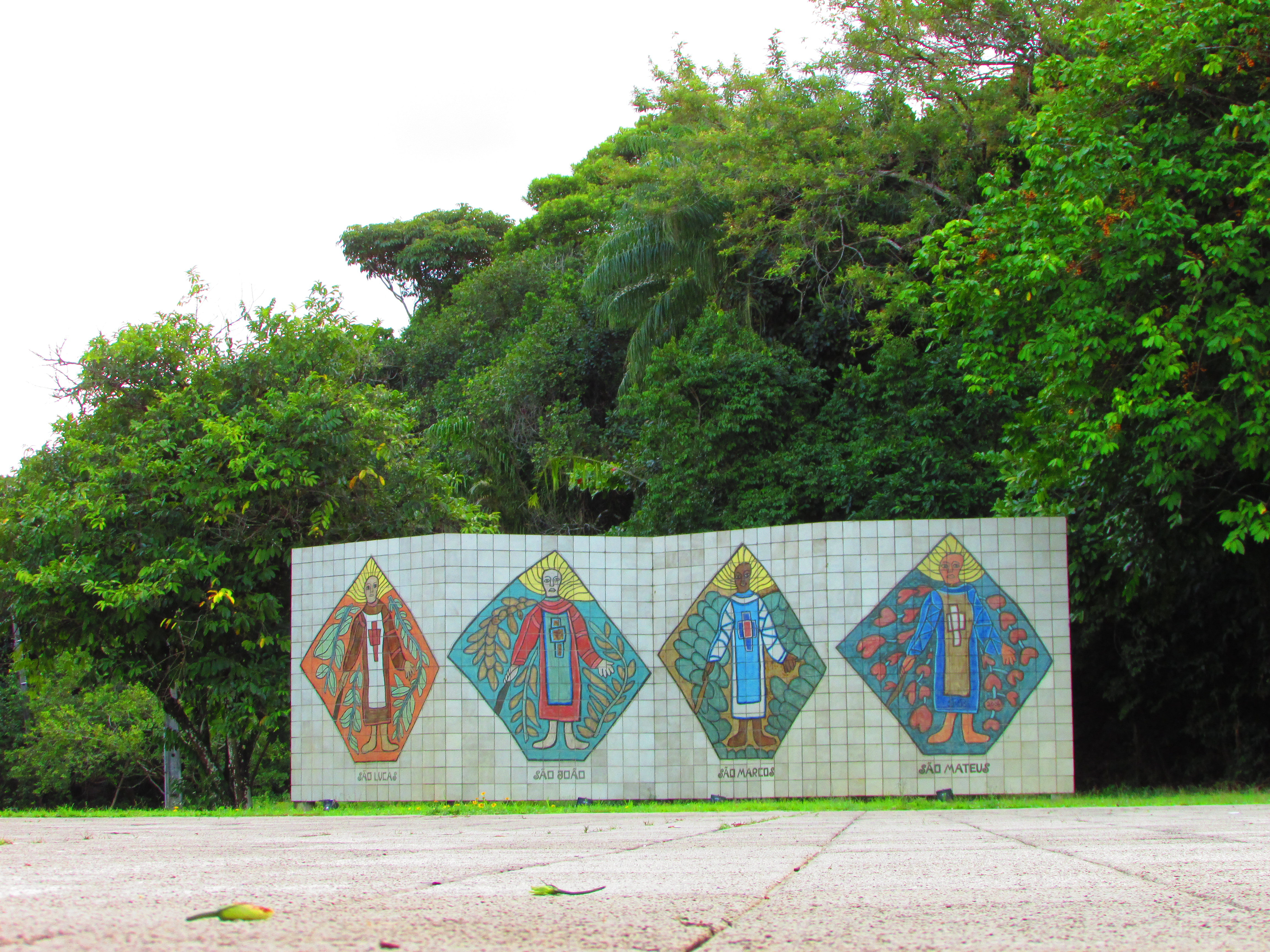 Os quatro Evangelhos pintados por Francisco Brennand